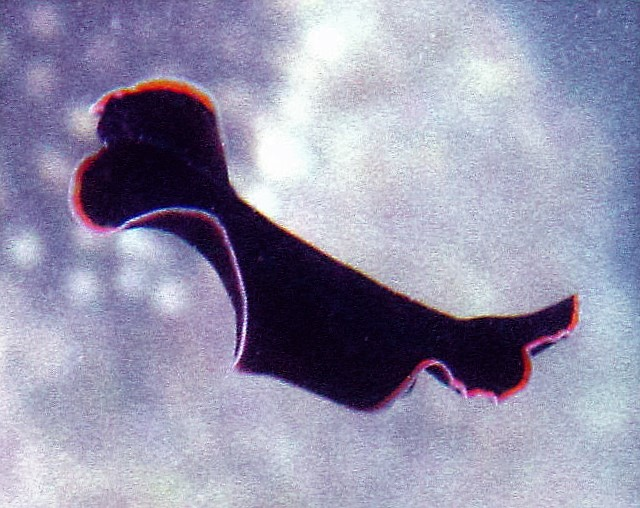 Pseudobiceros hancockanus, nadando en Koh Phangan, Tailandia